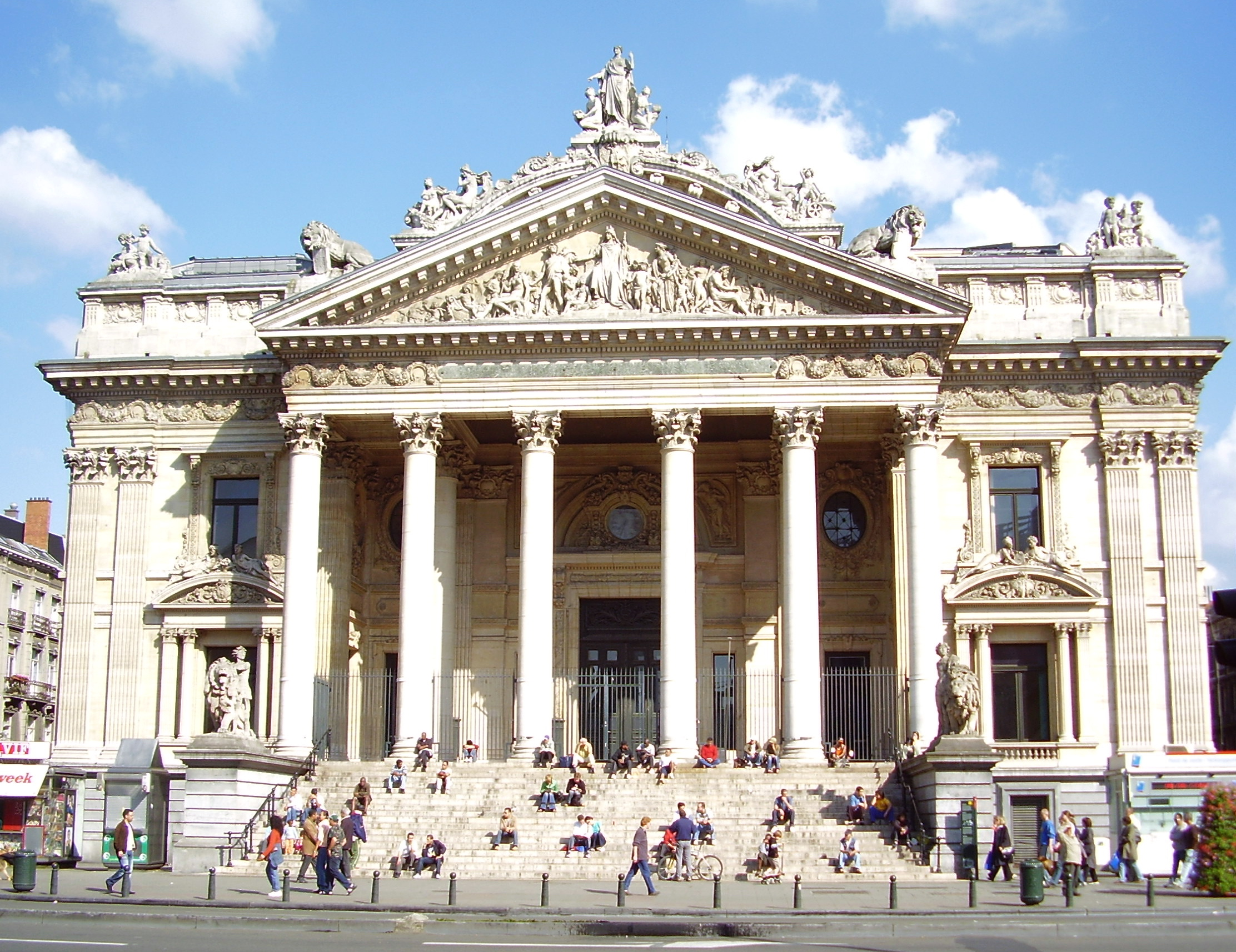 La Bourse de Bruxelles (1873), architecte: Léon-Pierre Suys